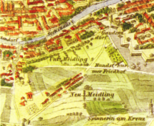 Neu-Meidling, das spätere Wilhelmsdorf, in einem Ausschnitt von Schweickhardt von Sickingen, Darstellung des Erzherzogtums Österreich unter der Enns, 1831